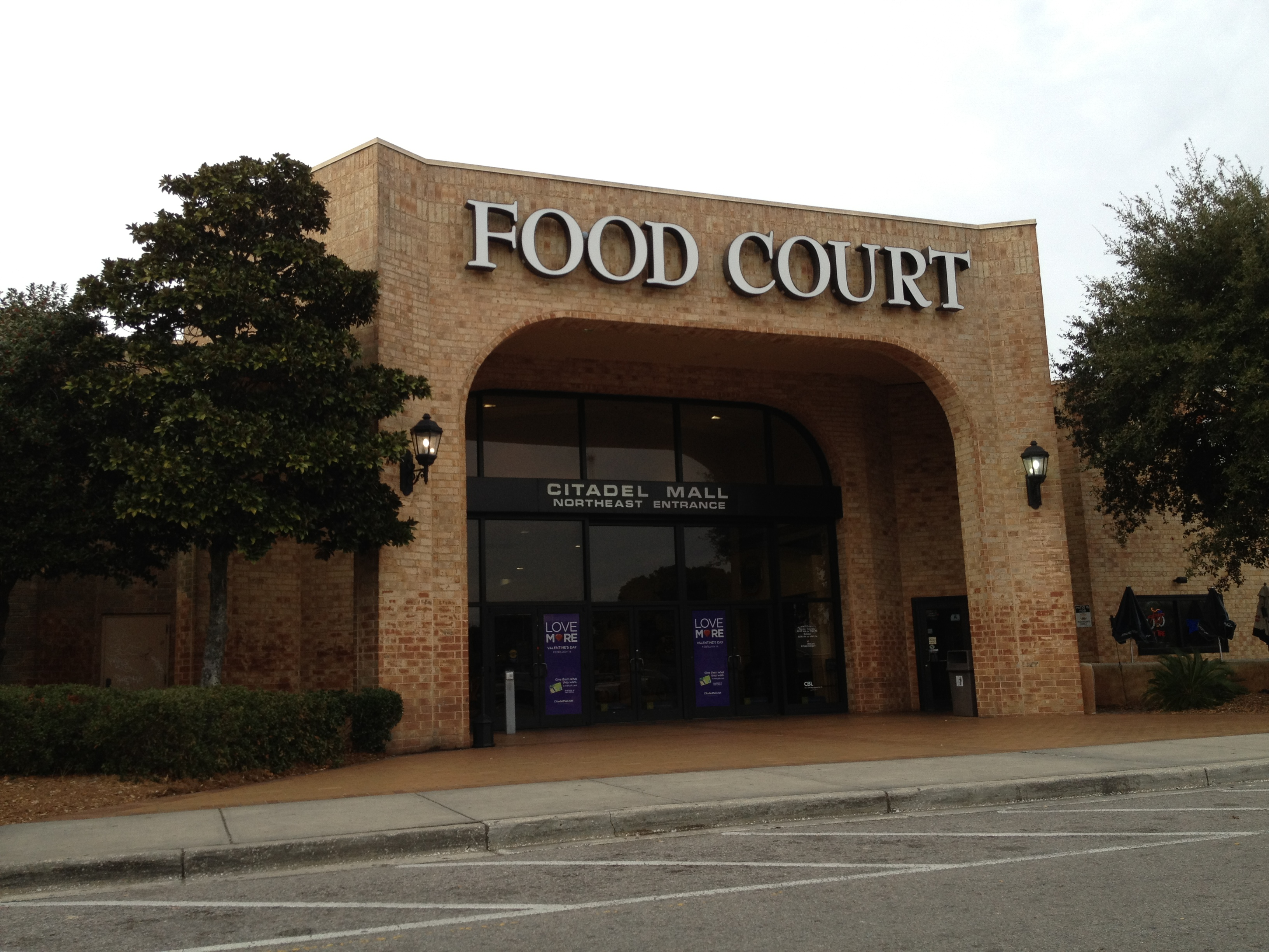 Citadel Mall